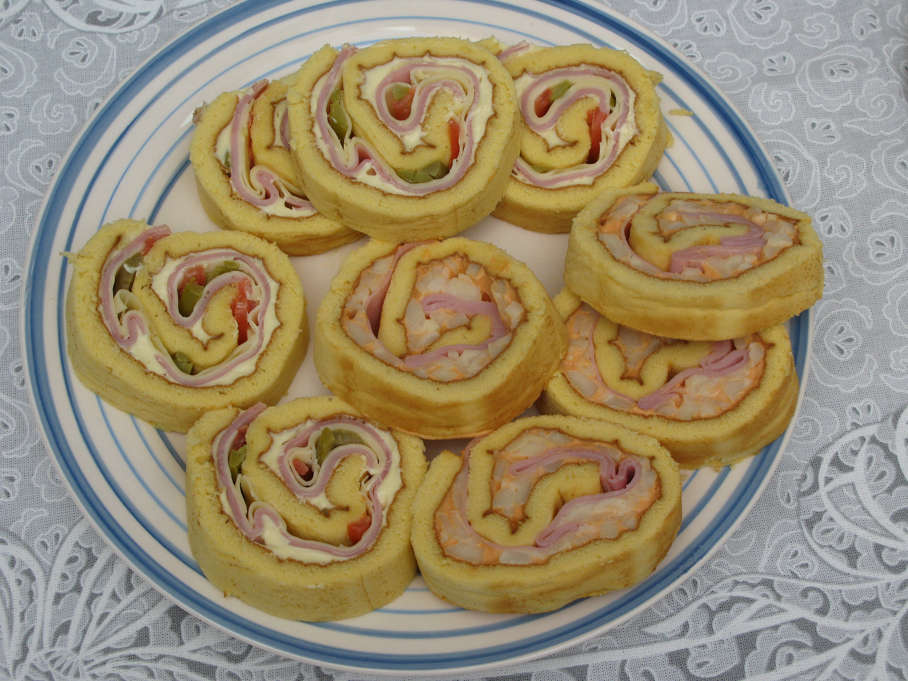 Piononos agridulces argentinos caseros cortados